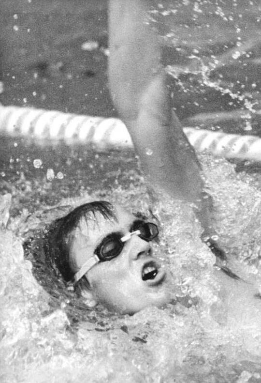 Dirk Richter ADN-ZB Kluge 26.5.84 Magdeburg: 35. DDR-Schwimm-Meisterschaften- Mit sehr guten 56,66 s über 100 m Rücken wurde Welt- und Europameister Dirk Richter (SC Einheit Dresden) bereist im Vorlauf seiner Favoritenrolle gerecht.